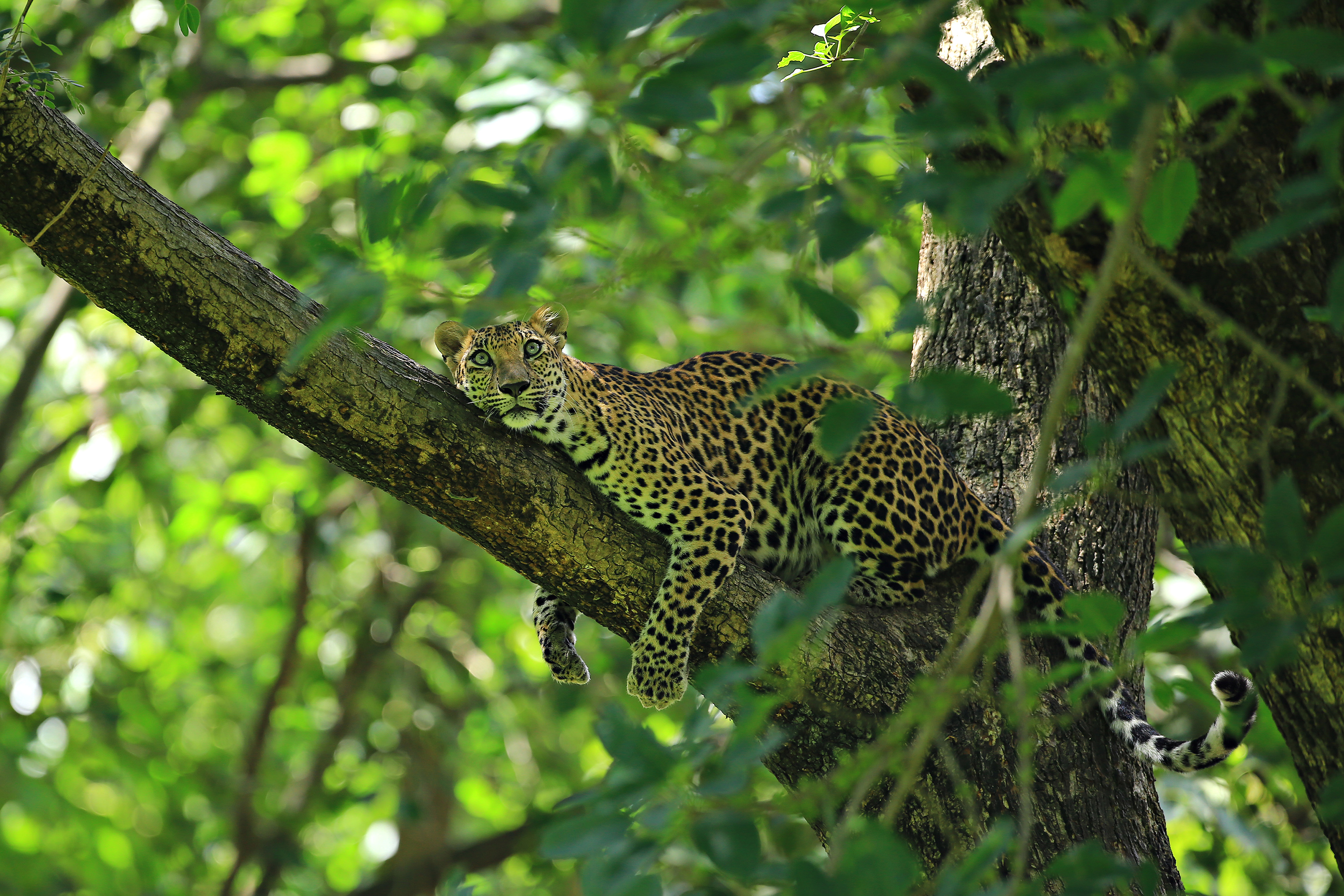 อุทยานแห่งชาติเขาแหลม